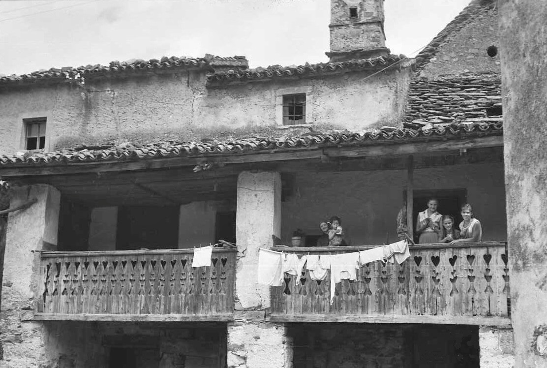 Špelna hiša, Lozice.